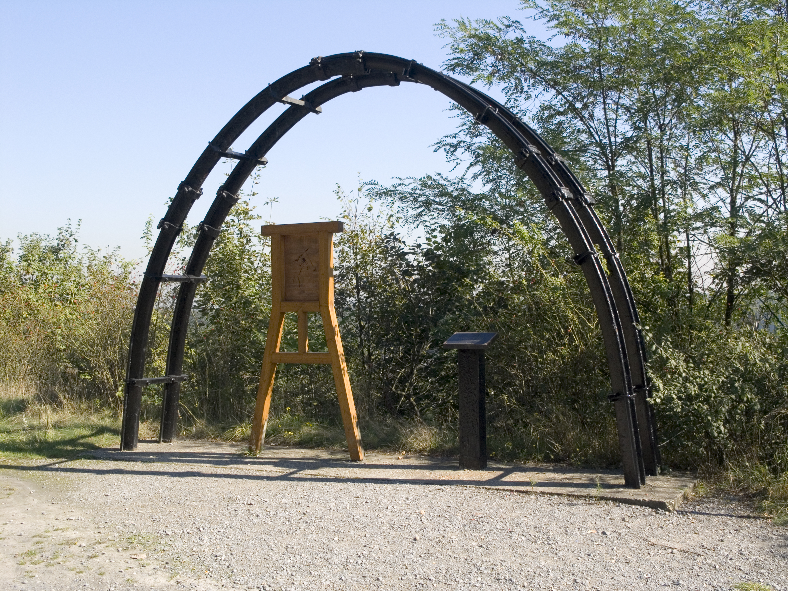 Северный Рейн-Вестфалия, Ботроп - террикон Ганиль